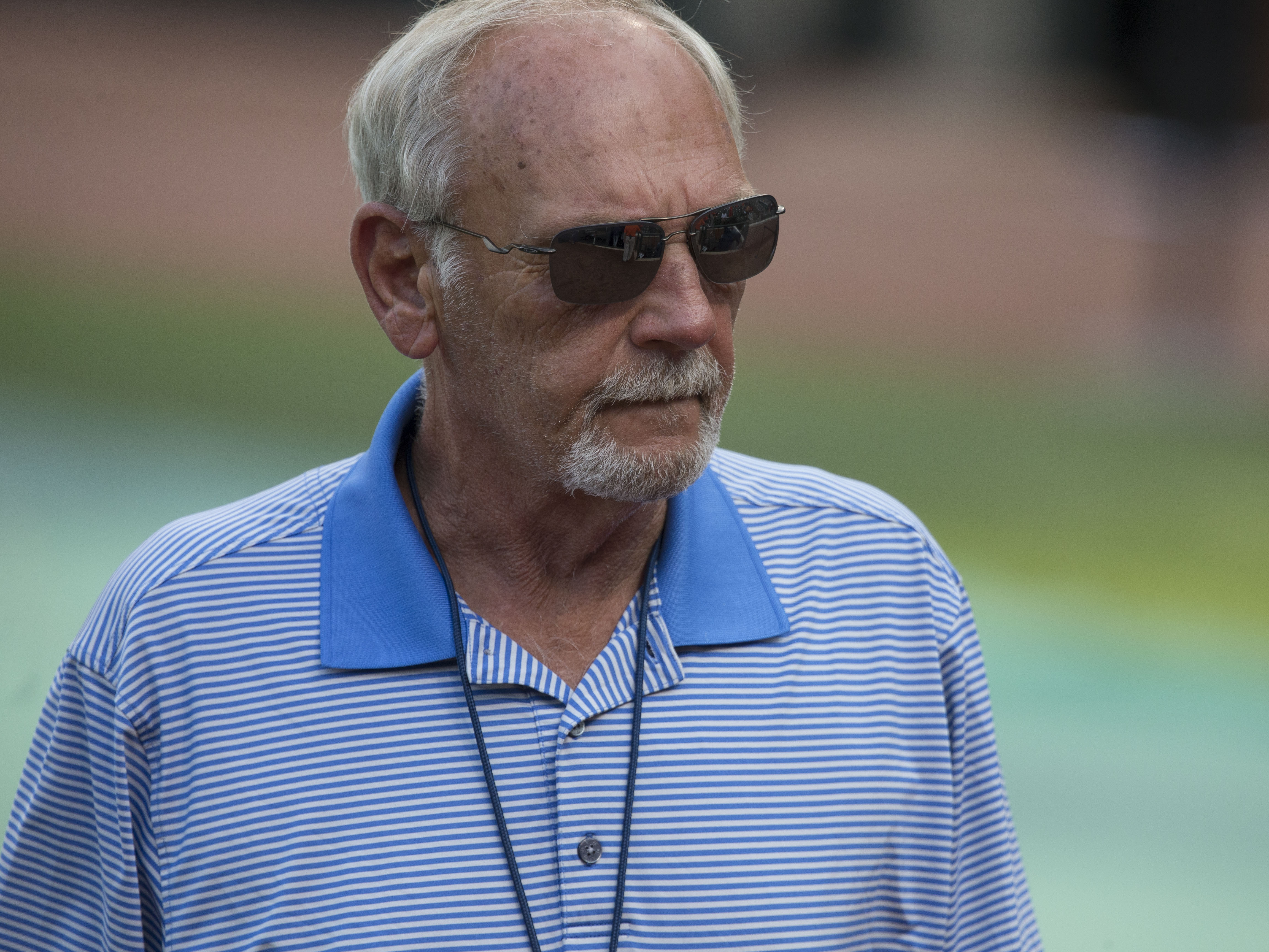 Tigers at Orioles 8/1/15